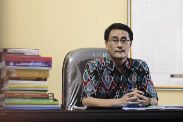 Kepala sekolah sman 7 tangerang 2011 - 2015